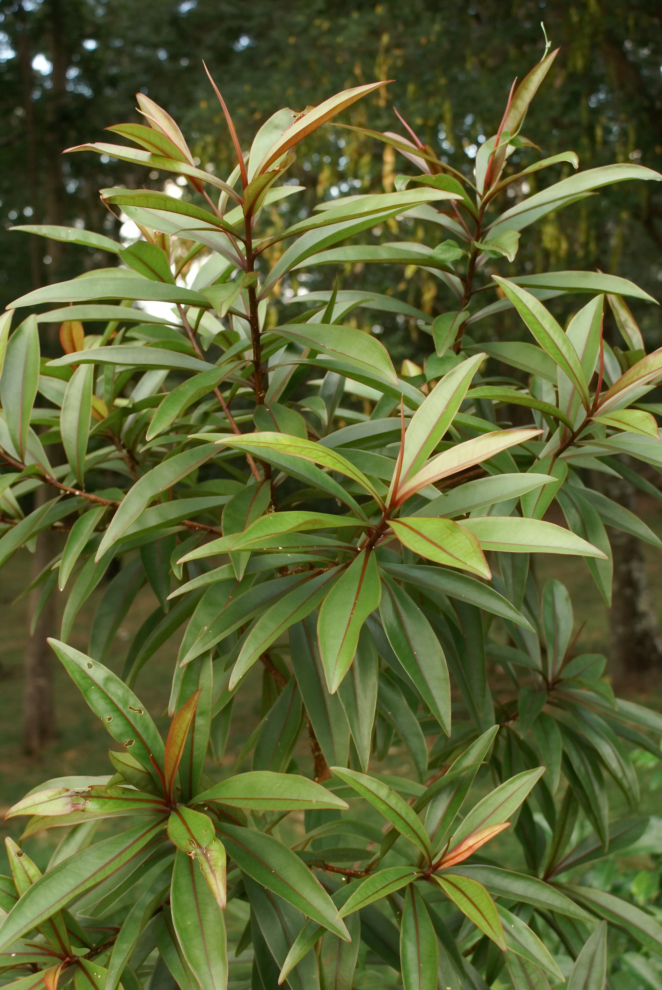 Feuillage d'un jeune Bois puant (Foetidia mauritiana), espèce endémique des Mascareignes